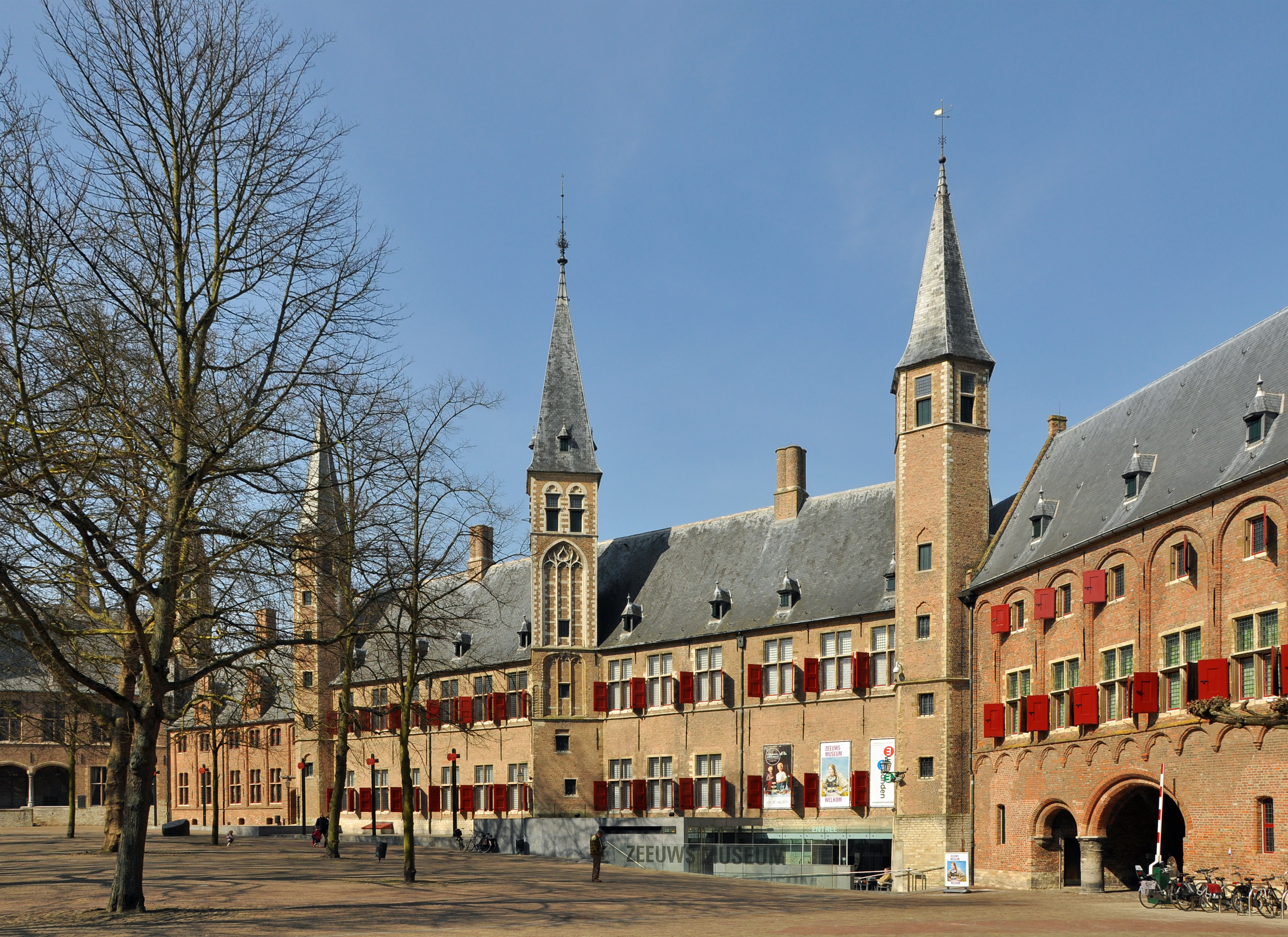 Zicht op een deel van de (voormalige) abdij van Middelburg met het Zeeuws Museum, Middelburg (provincie Zeeland, Nederland). Gelegen nabij het Abdijplein in het centrum van Middelburg